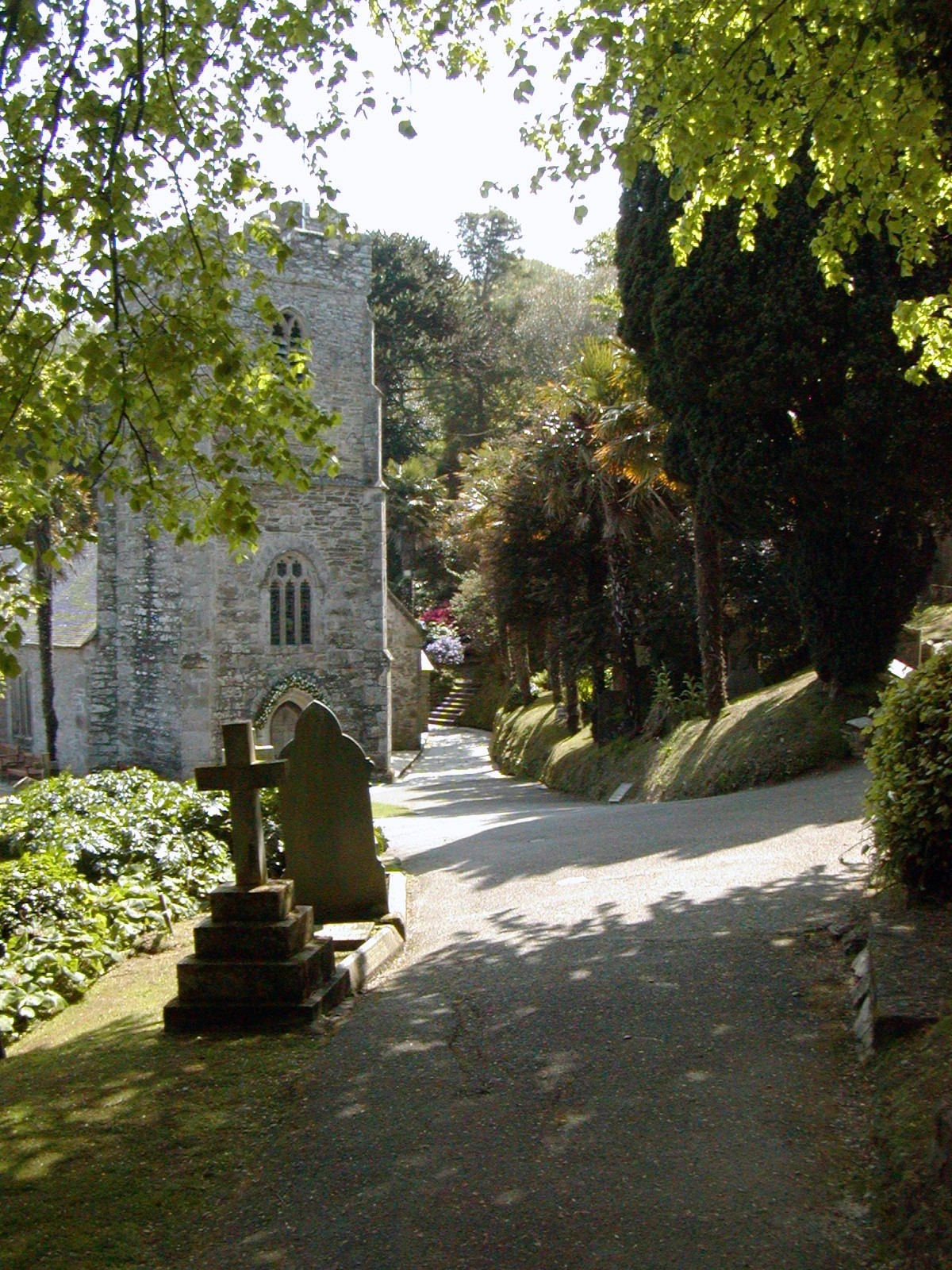 Churchyard of St Just in Roseland, Cornwall